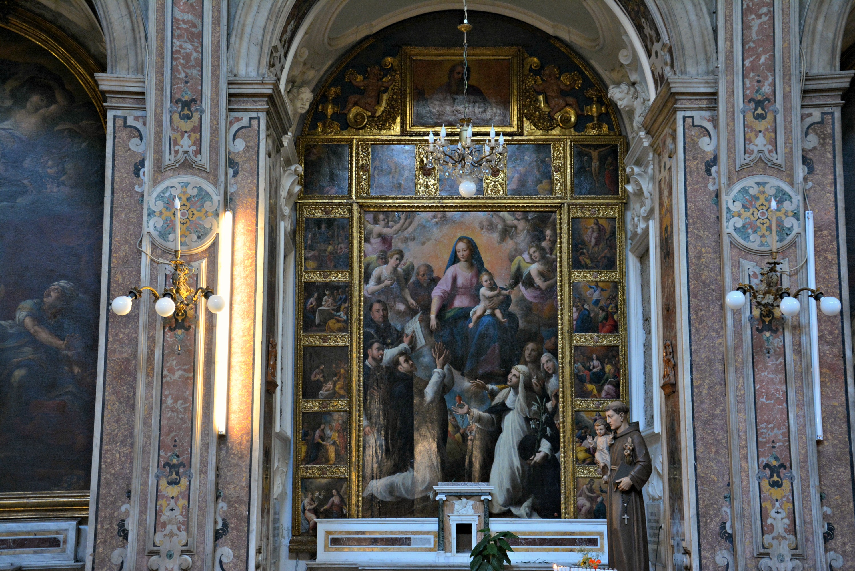 Chiesa di Santa Maria Egiziaca a Forcella a Napoli